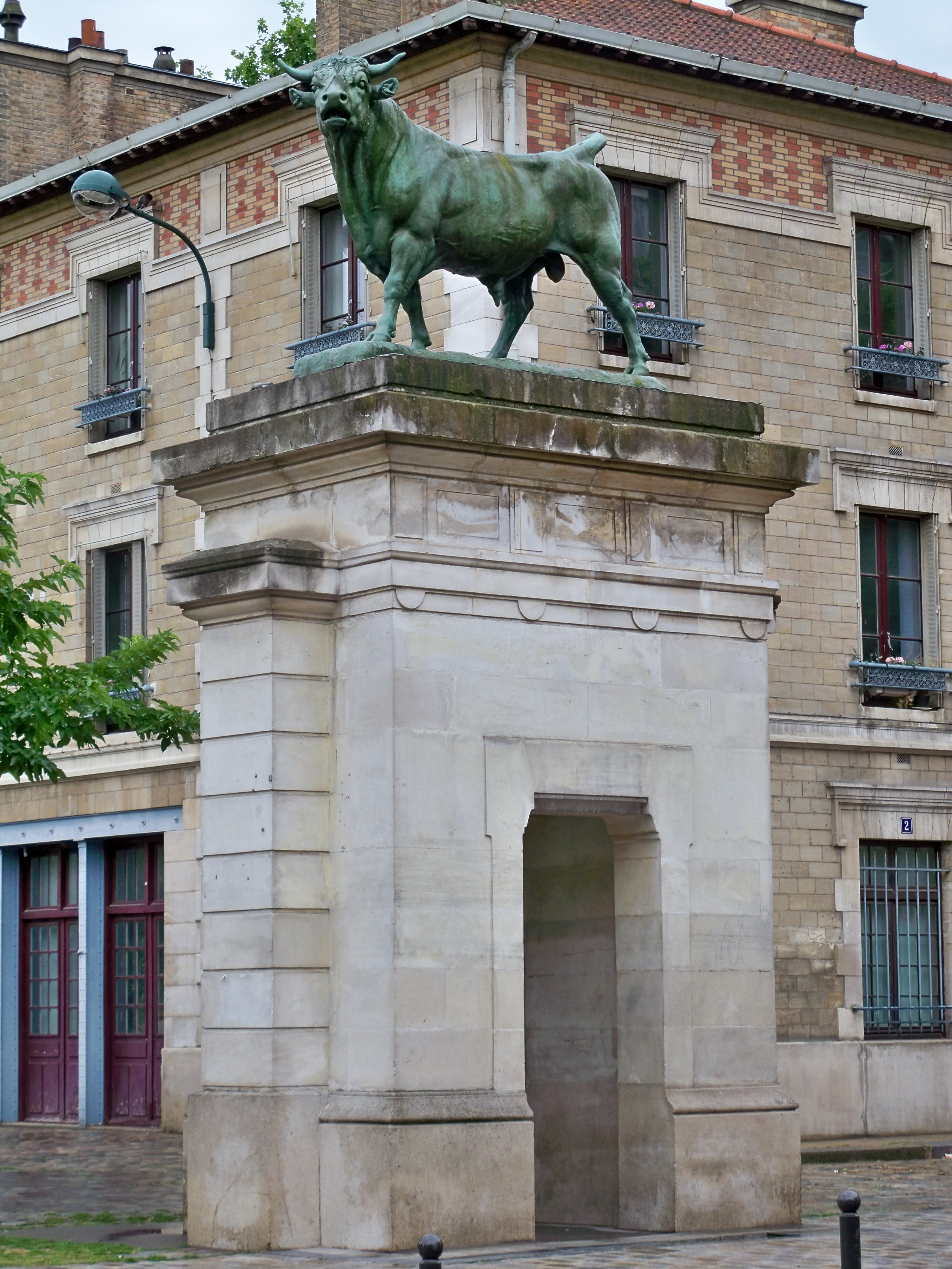 une des entrées du parc Georges Brassens, Paris